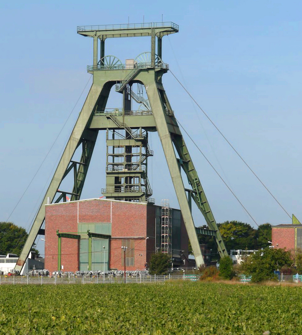 asdsd